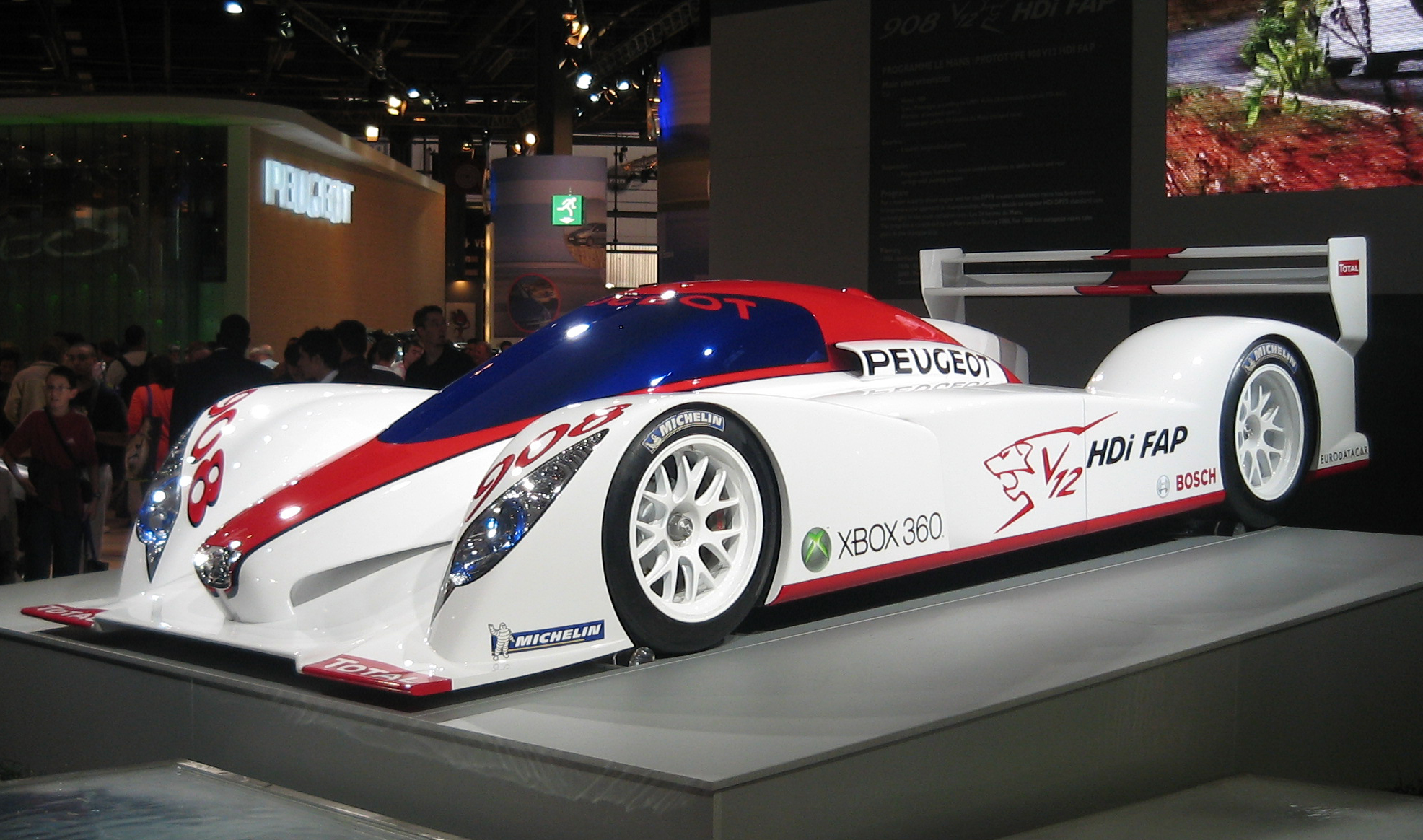 Peugeot 908, V12 diesel powered Le Mans prototype